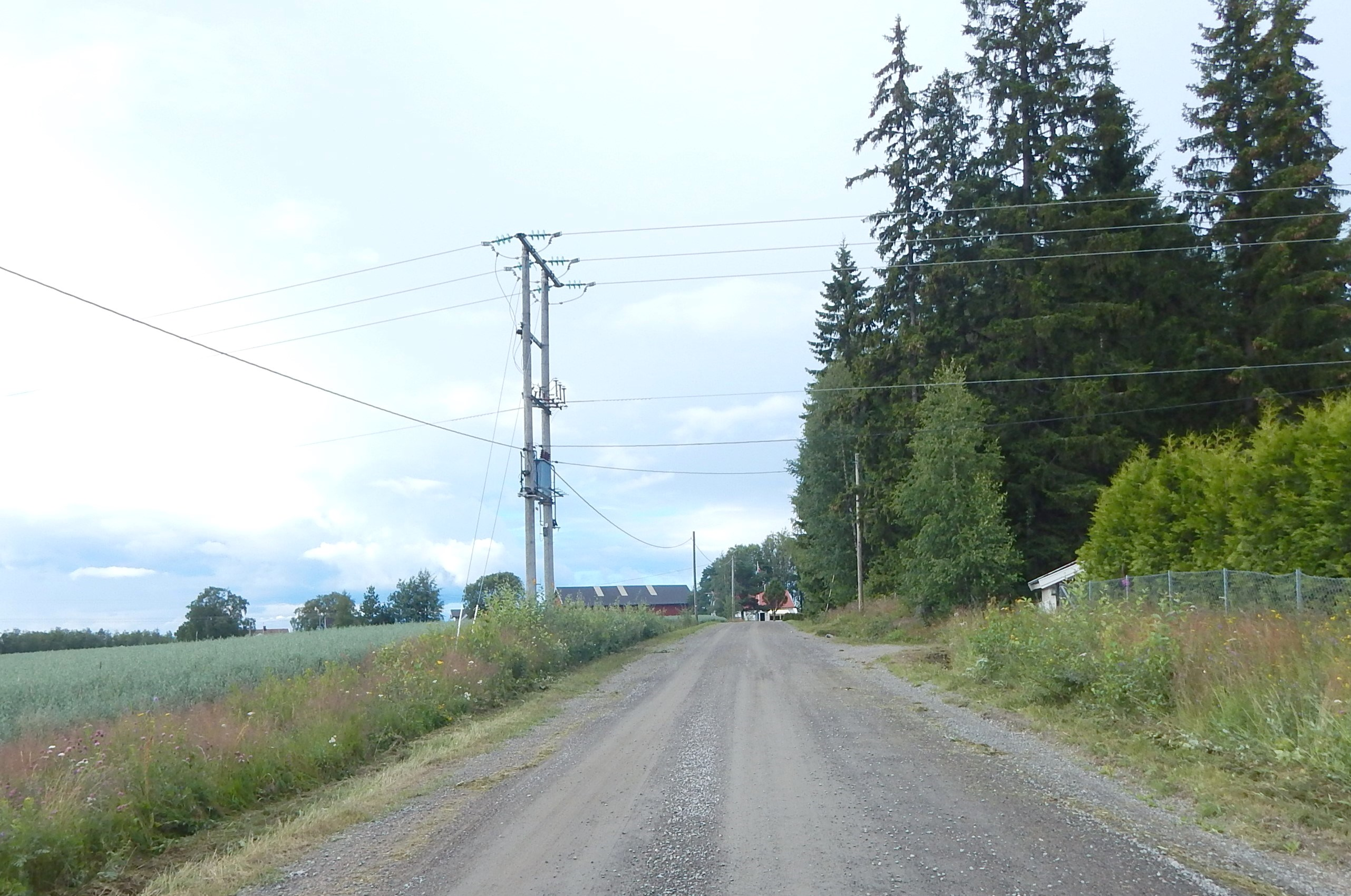 Ilagsvegen (fylkesvei 1982, tidl. 339)